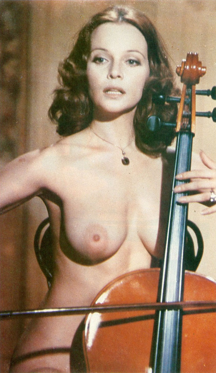 L'attrice italiana Laura Antonelli in uno scatto di scena sul set del film Il merlo maschio (1971) di Pasquale Festa Campanile.